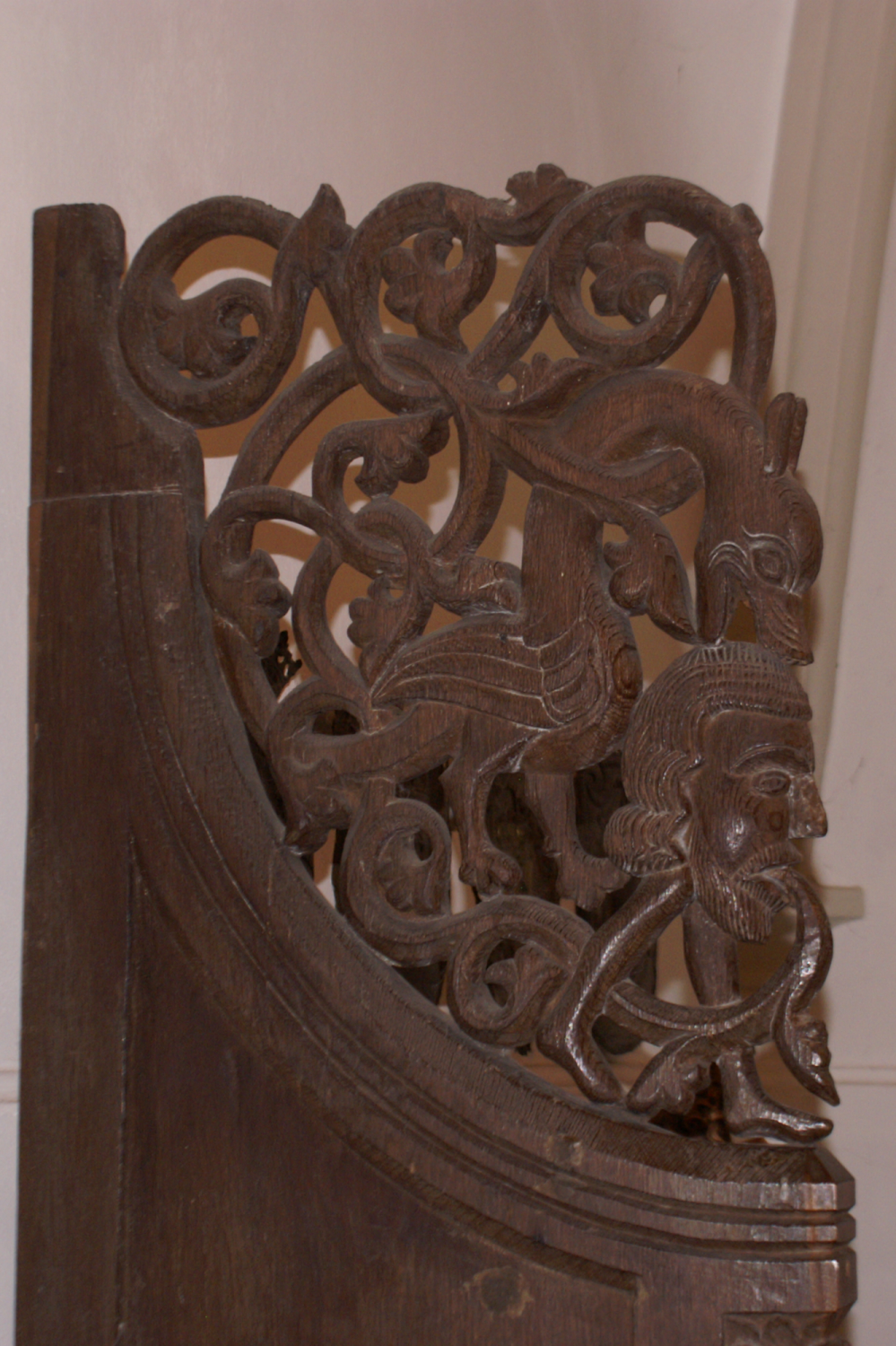 Schnitzerei am Nonnenchorgestühl des St.-Johannis-Klosters vor Schleswig.